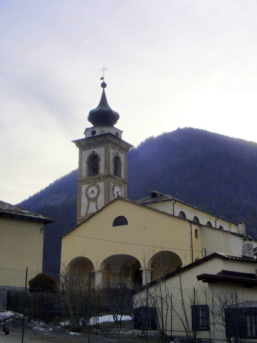 Oulx